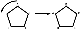 Rotazione di un pentagono regolare di 72° . È un elemento del gruppo diedrale . A regular pentagon rotation of 72° a regular pentagon . It is an element of the dihedrial group .